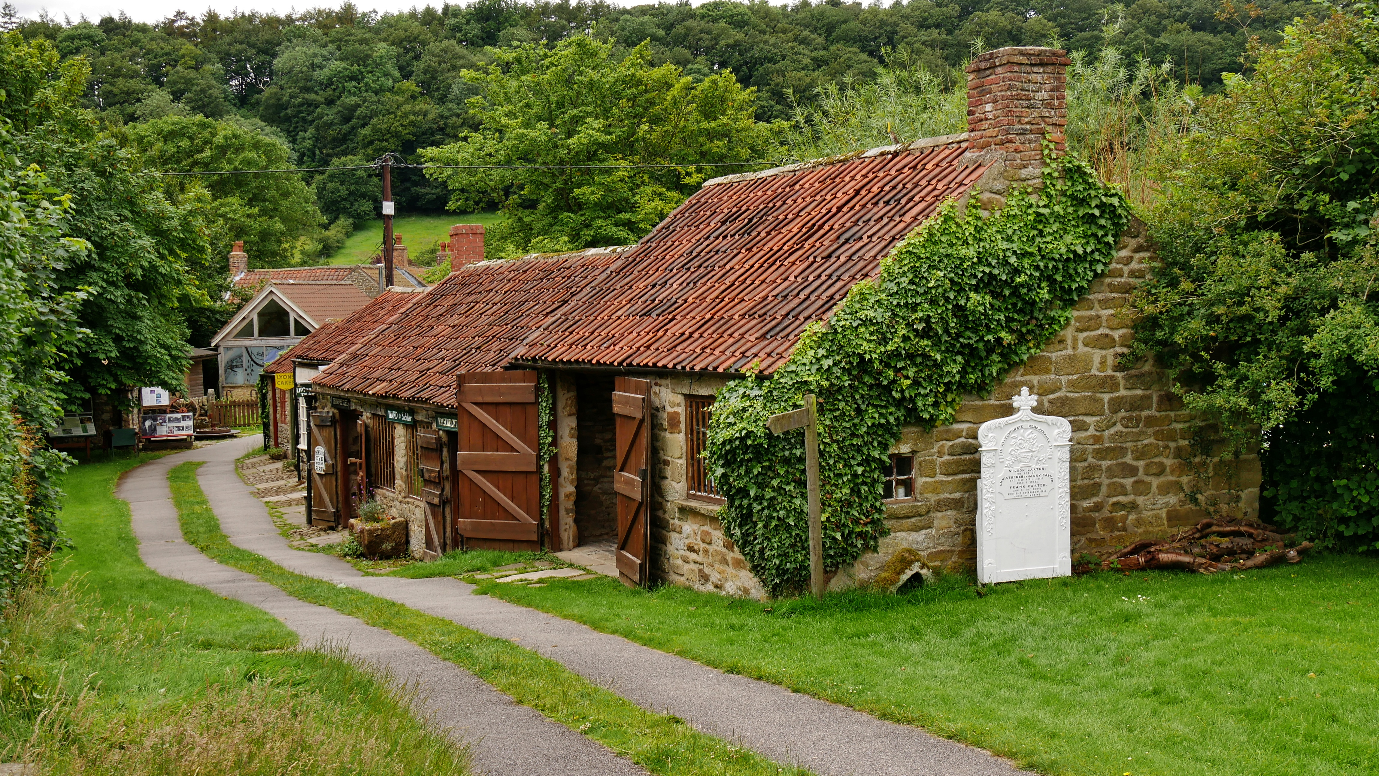 Ryedale Folk Museum Workshops near the museus's entrance